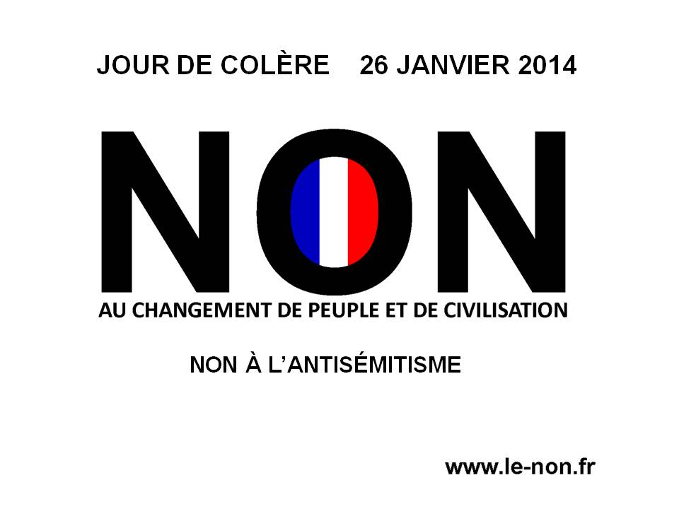 Tract du NON au changement de peuple et de civilisation pour la manifestation « Jour de colère » du 26 janvier 2014.